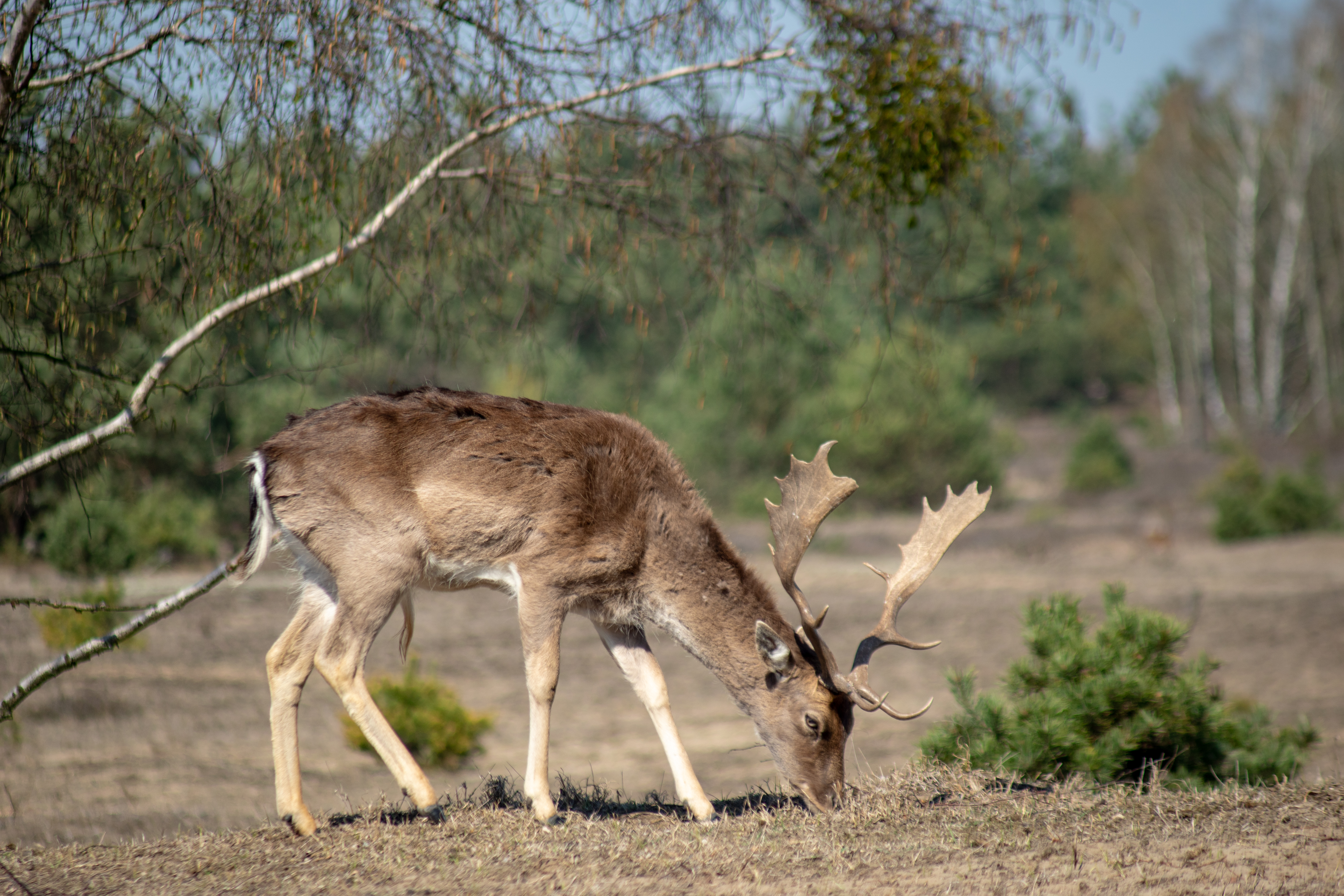 Beweidung der Schönower Heide durch Dammwild